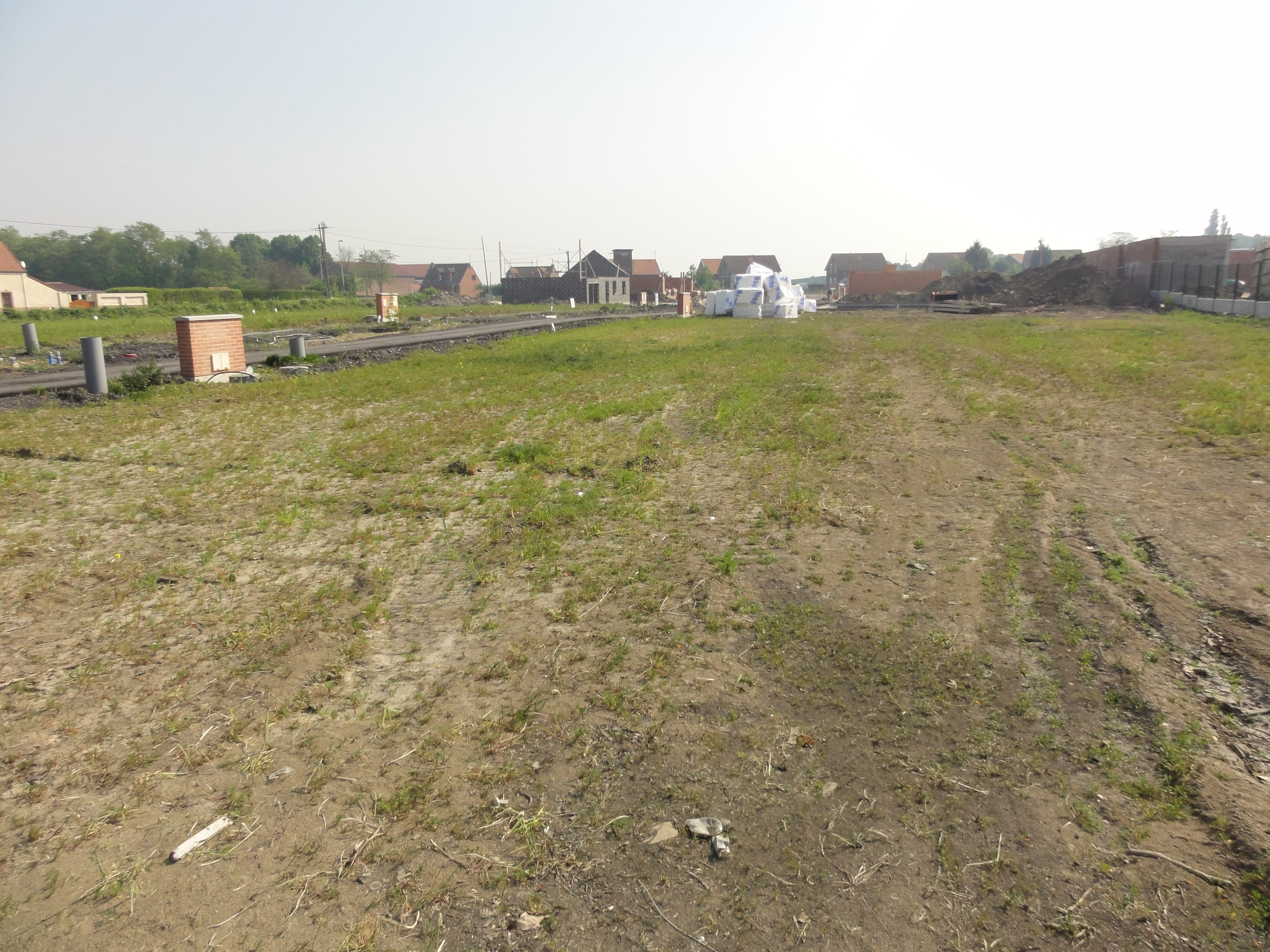 Terril n° 148 dit Casimir Périer Est, Fosse Casimir Périer de la Compagnie des mines d'Anzin, Somain et Fenain, Nord, Nord-Pas-de-Calais, France.